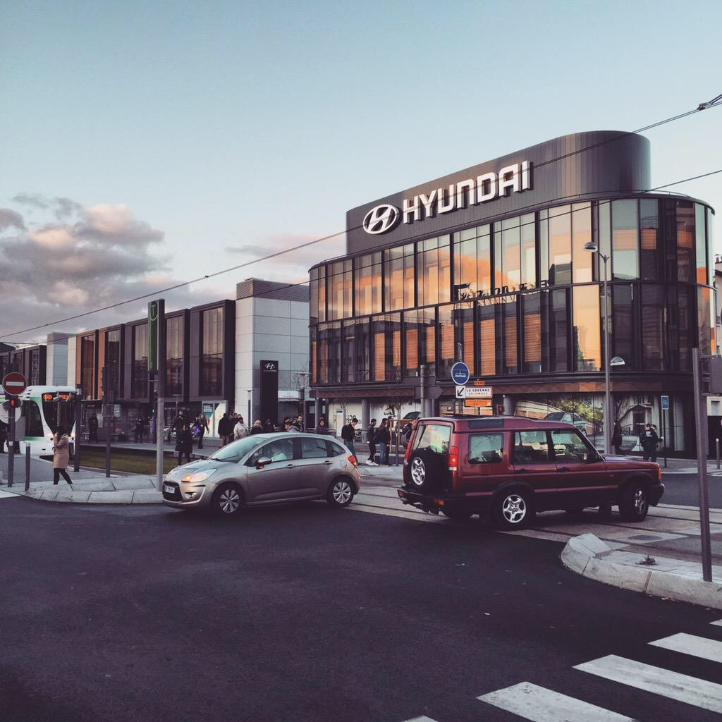 Siège de Hyundai Motors en France, à La Garenne-Colombes, partie nord du territoire de La Défense (EPADESA)